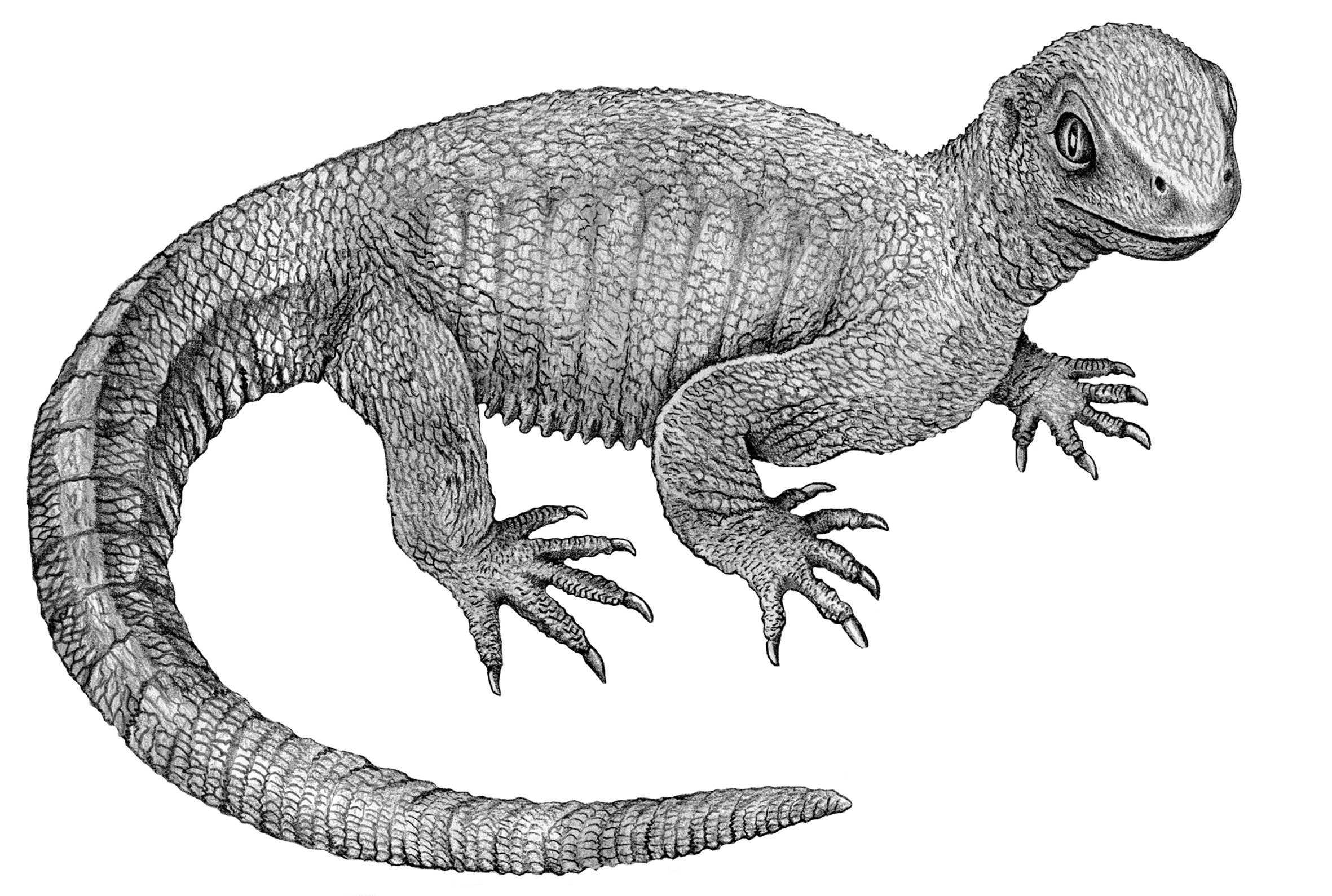 Life restoration of Pappochelys rosinae